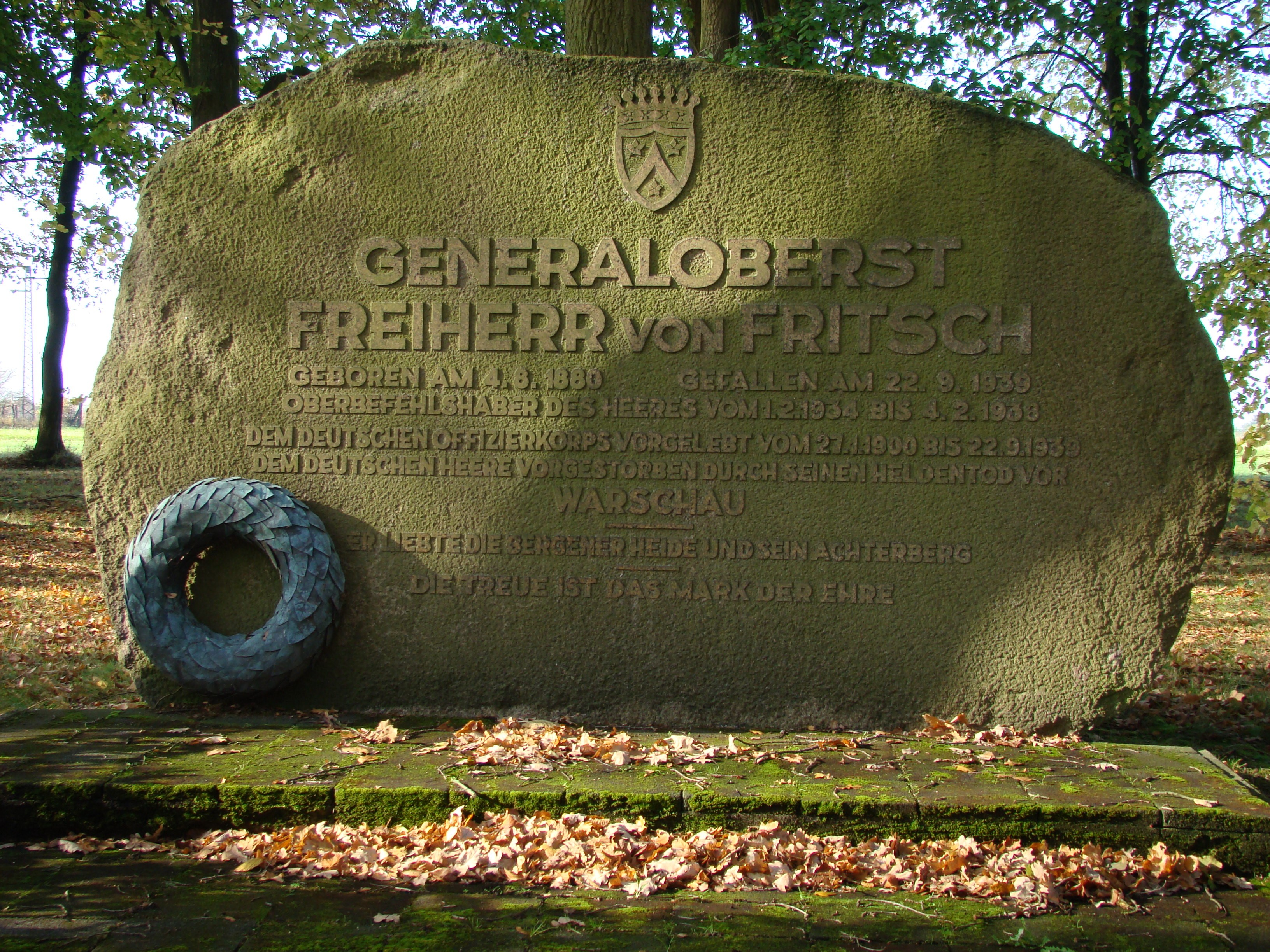 Ehrendenkmal für Generaloberst Werner Freiherr von Fritsch in Bergen-Belsen (Niedersachsen)